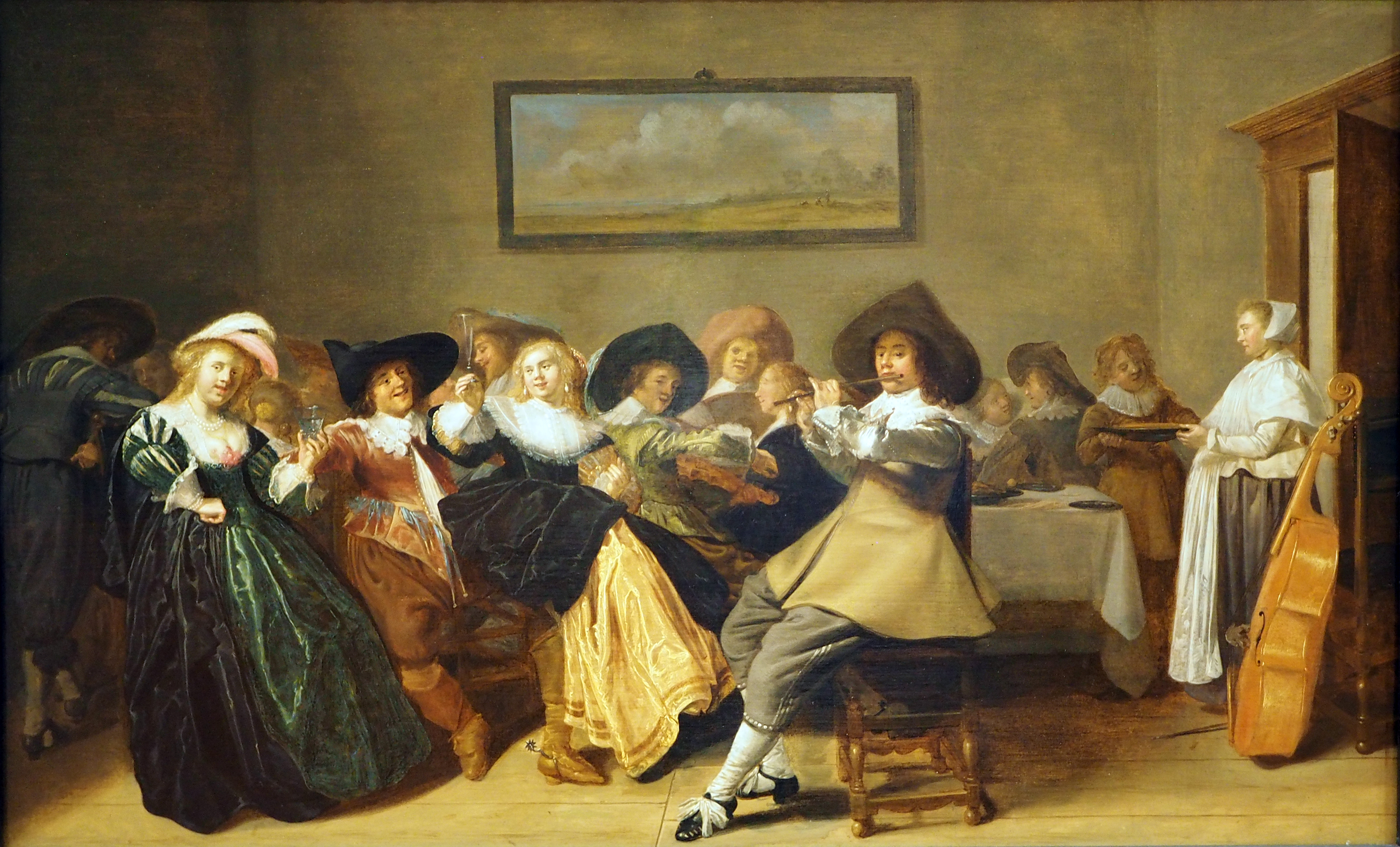 Paare der gehobenen holländischen Gesellschaft sitzen trinkend und musizierend an einer langen Tafel.